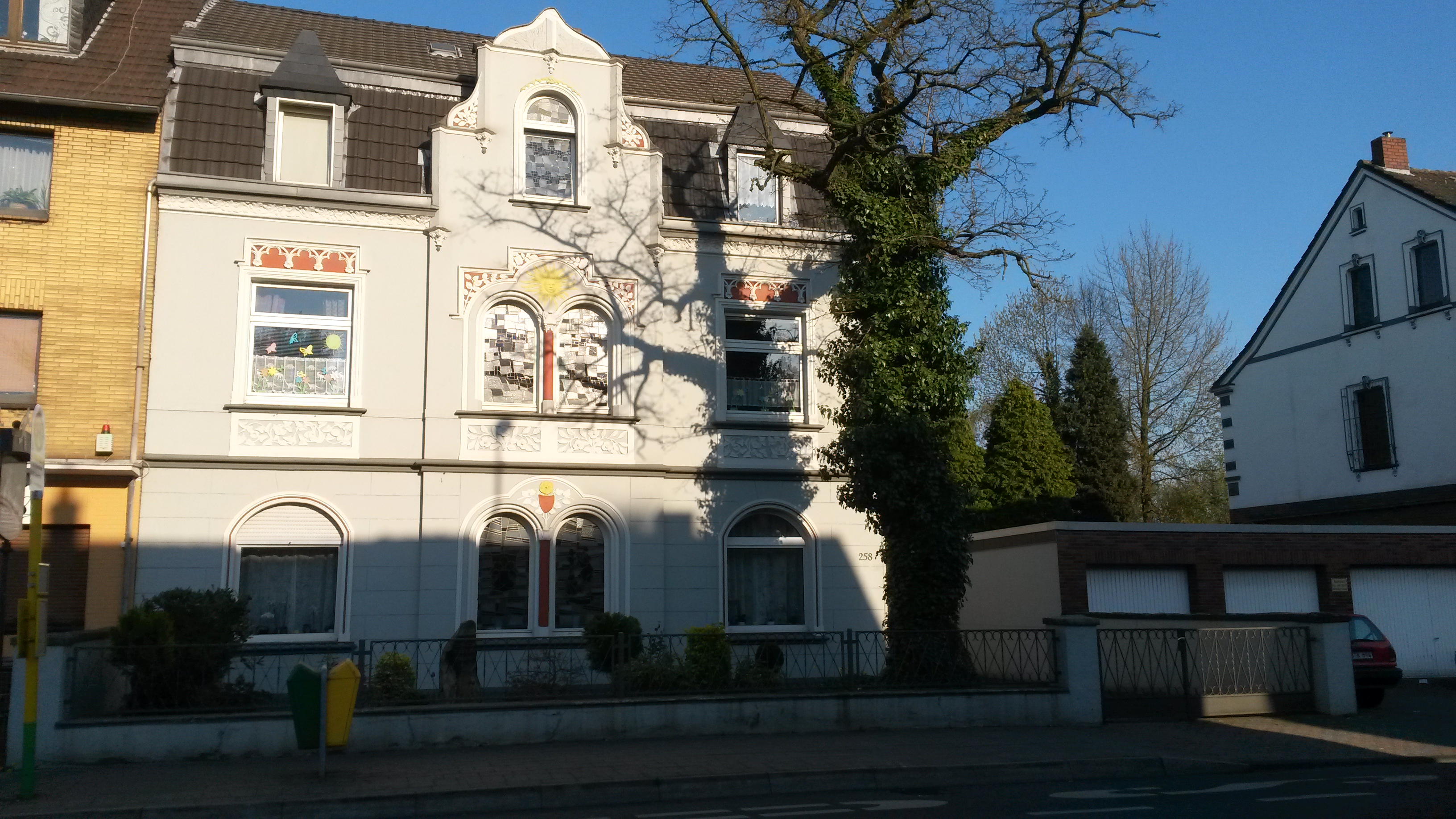 Das ehemalige Gemeindeamt von Alstaden